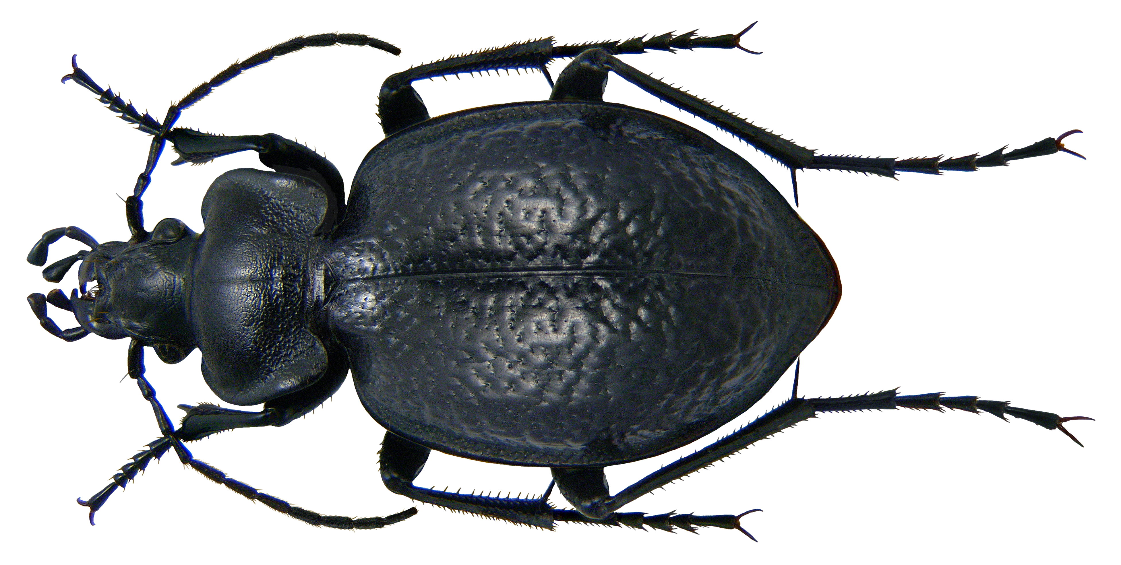 Familie: Carabidae Grösse: 22 mm Fundort: Marokko, Moy Atlas, Azrou, Ibel Hebri, 1950 m leg. Staven/Gremmels, 2000; det. K.Staven, 2000 Foto: U.Schmidt, 2009